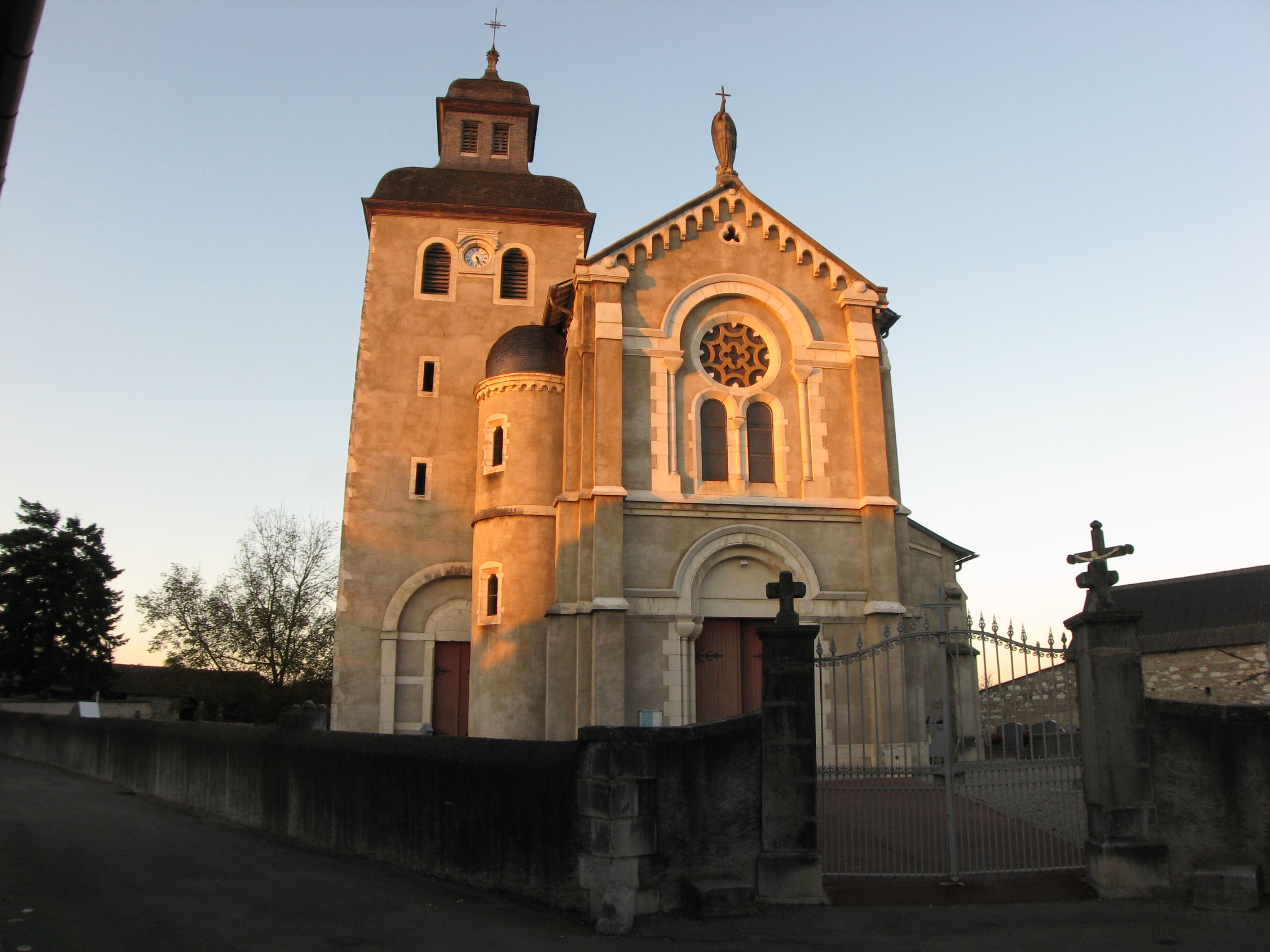 Eglise de Pardies-Pietat (Pyrénées).